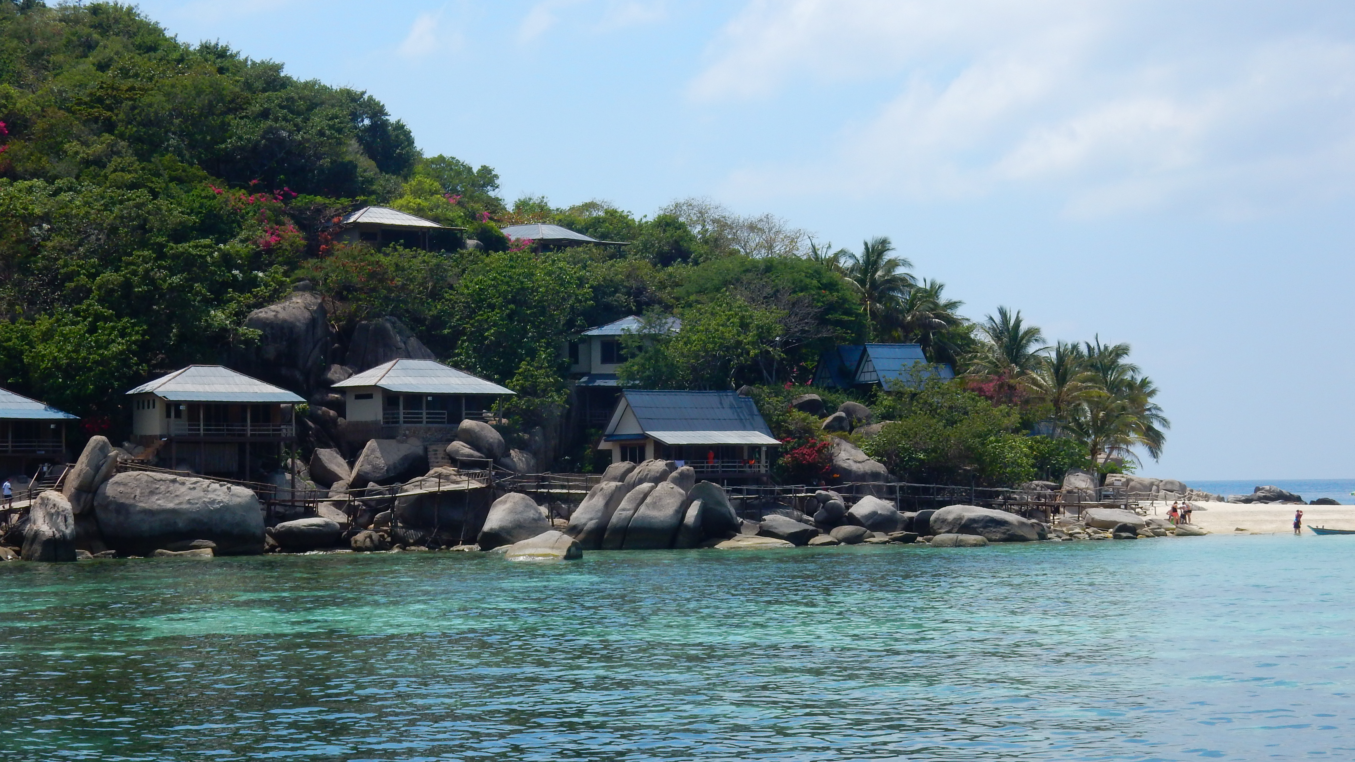 Ko Tao 2015, febr.